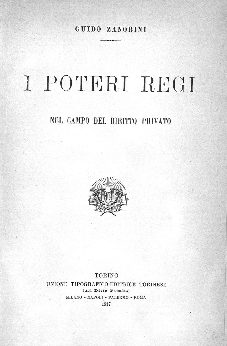 Frontespizio